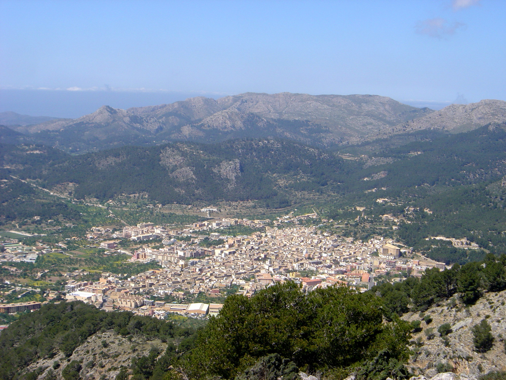 Andratx des de Garrafa. Mallorca.